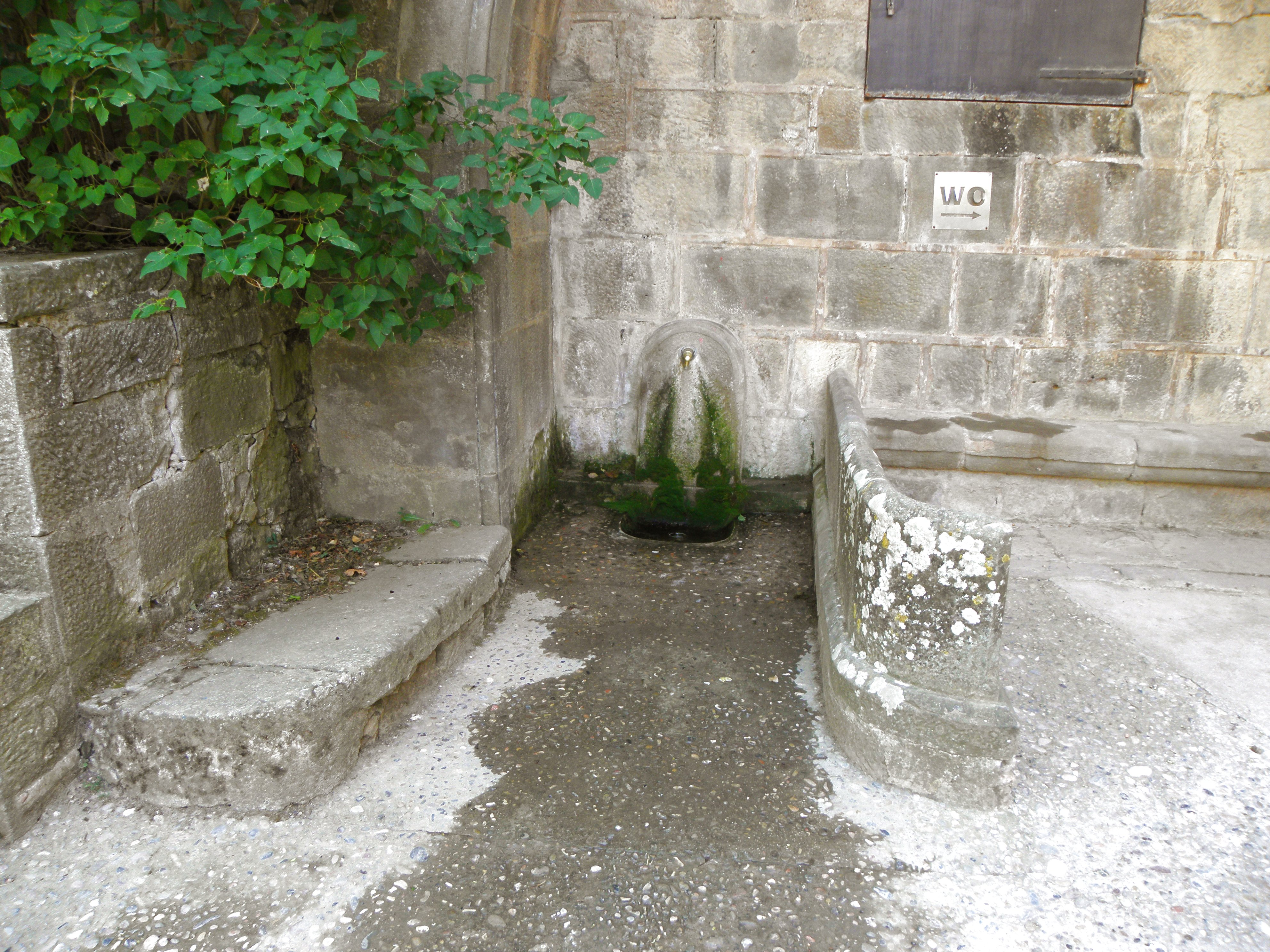 El Miracle (Riner, Solsonès). La font de la Mare de Déu.